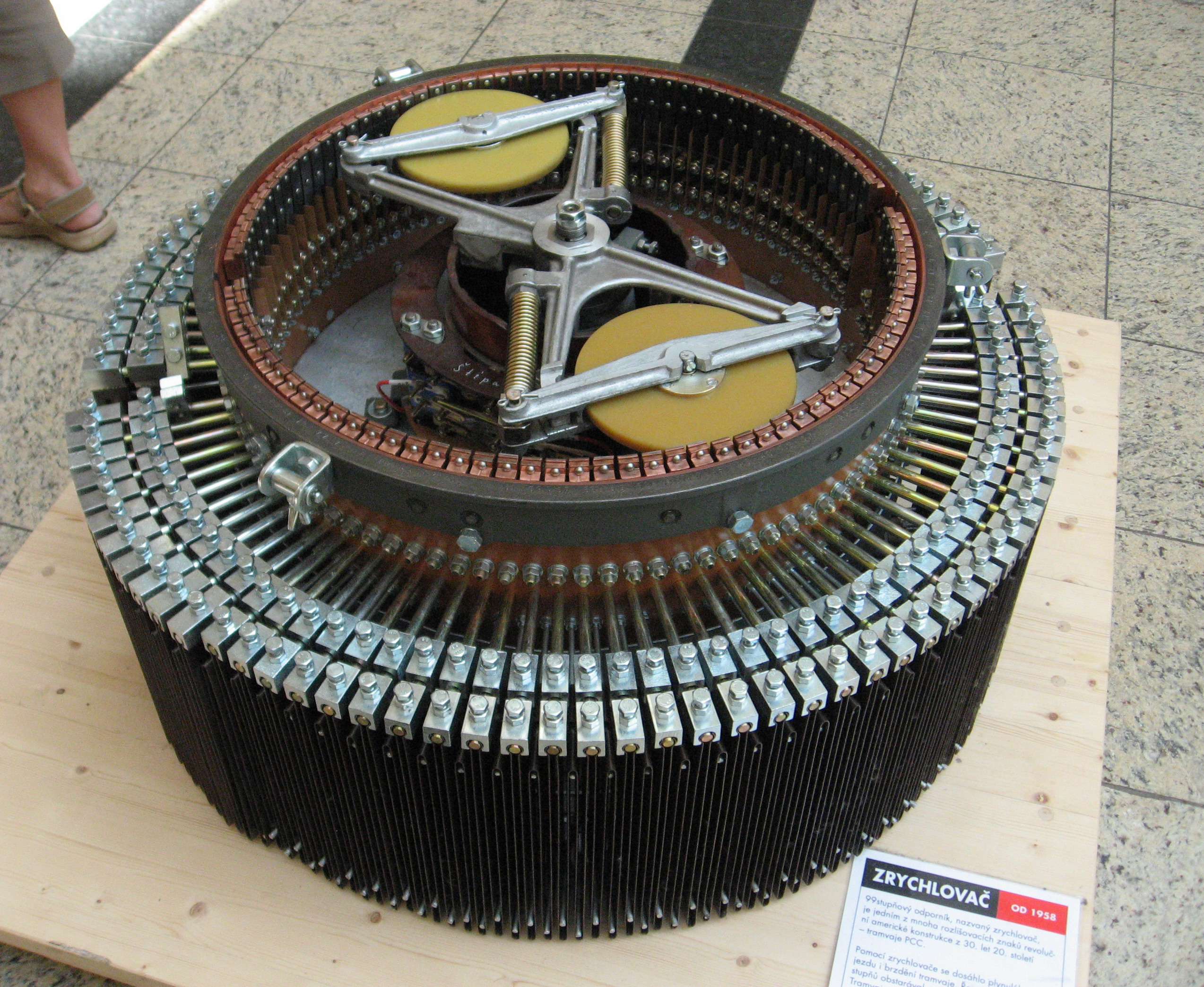 Zrychlovač